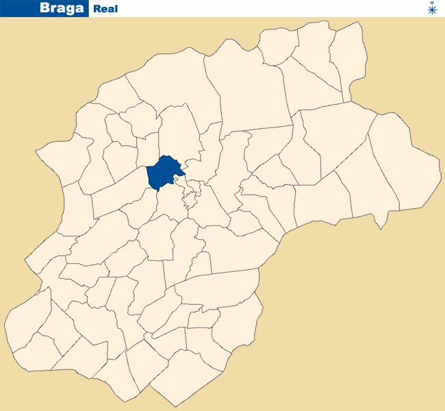 Localização de Real no concelho de Braga.